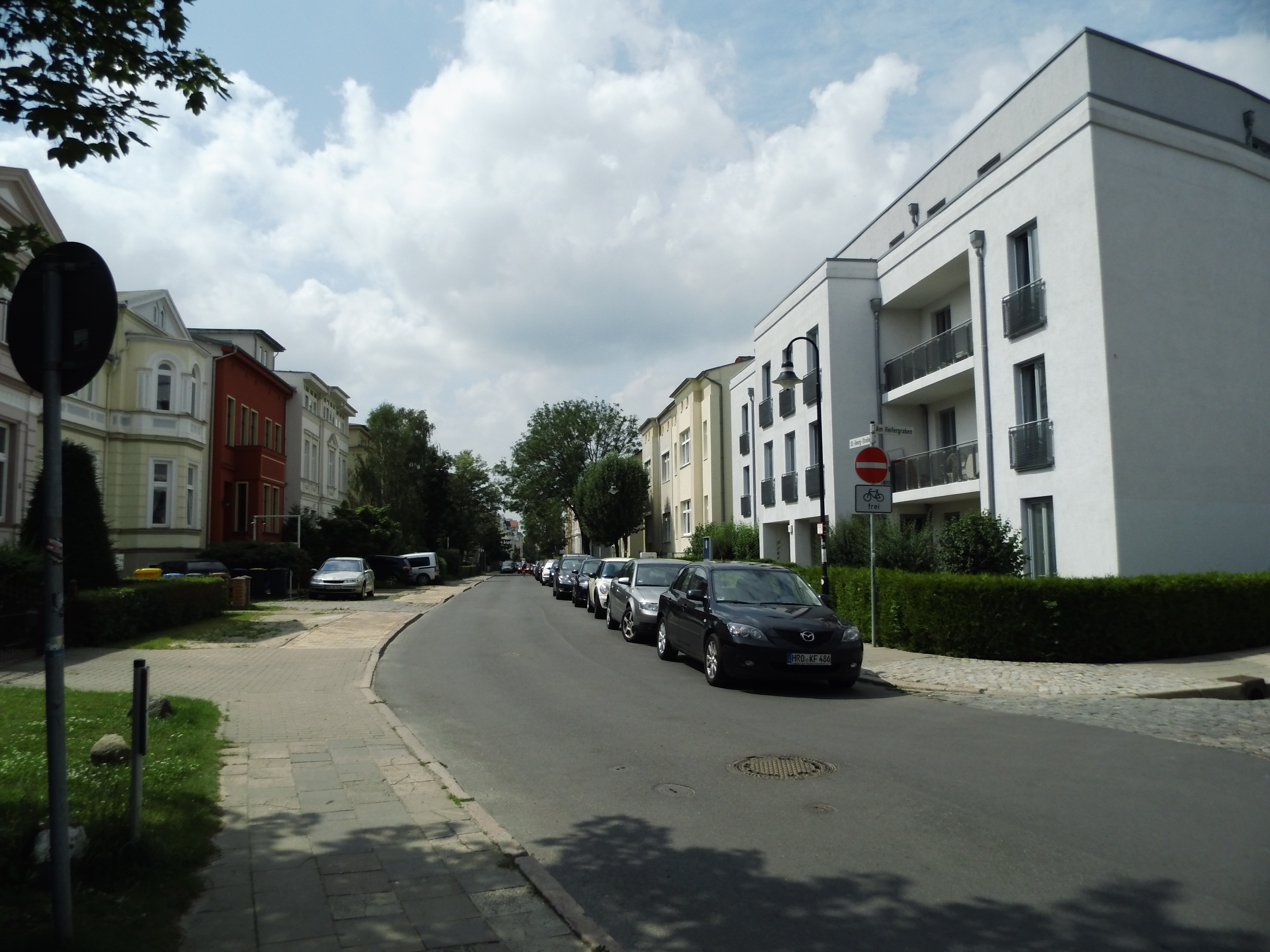 St. Georg Straße in der Rostocker Steintor-Vorstadt, fotograffiert vom Leibnitzplatz aus